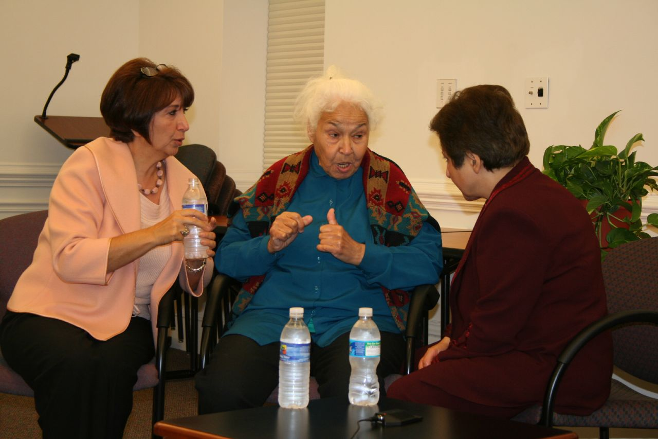 Shirin Ershadi, Shirin Ebadi and Nawal el-Saadawi شيرين عبادي مع نوال السعداوي بجامعة ديوك